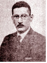 大川周明 Shūmei Ōkawa (1886–1957)